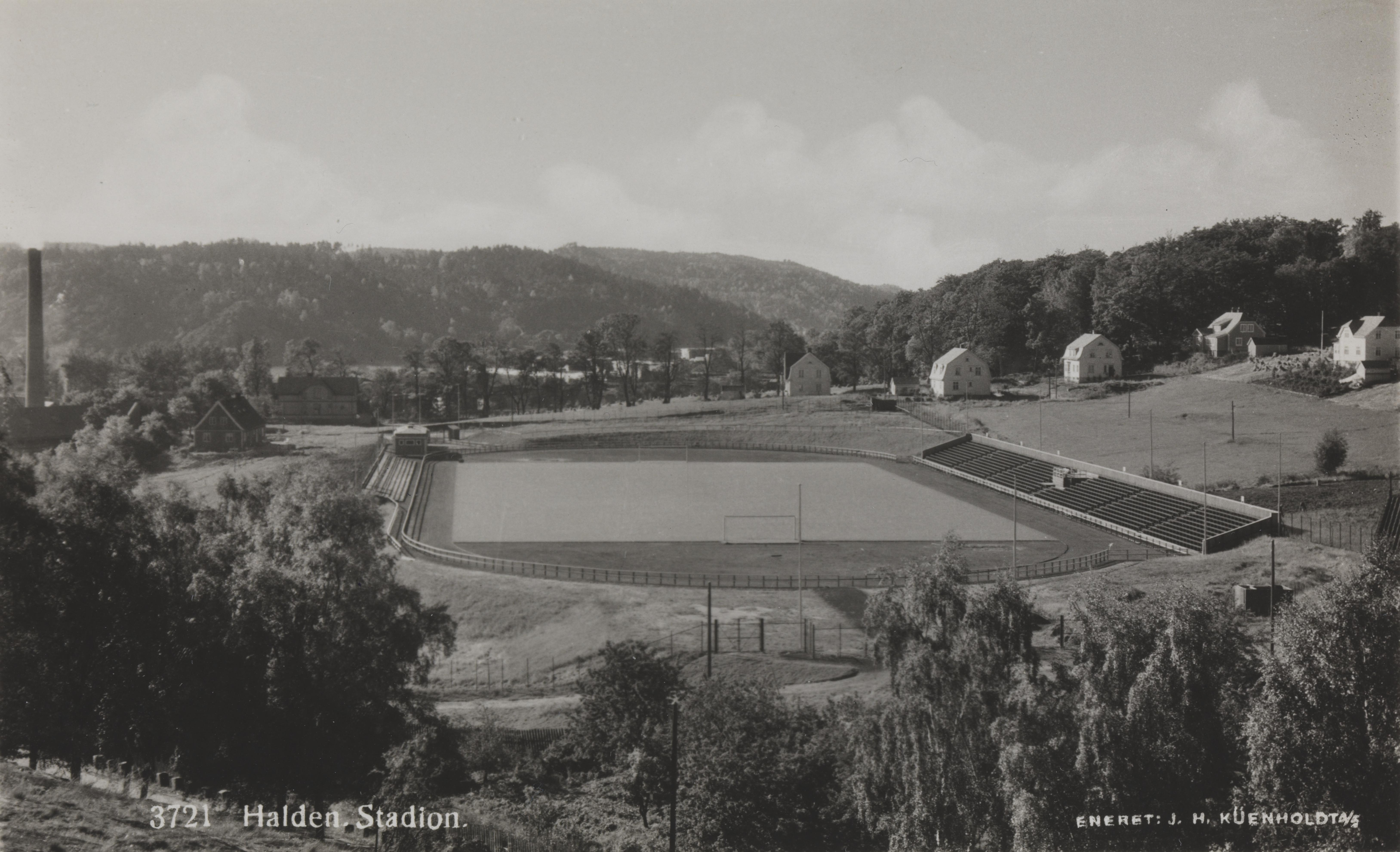 Bildet er hentet fra Nasjonalbibliotekets bildesamling Halden,Halden stadion, Halden, Østfold